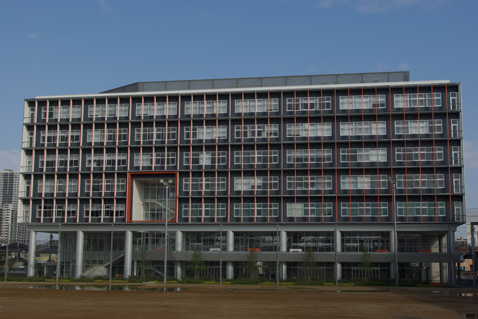 敬愛大学3号館